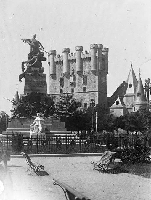 Imatge